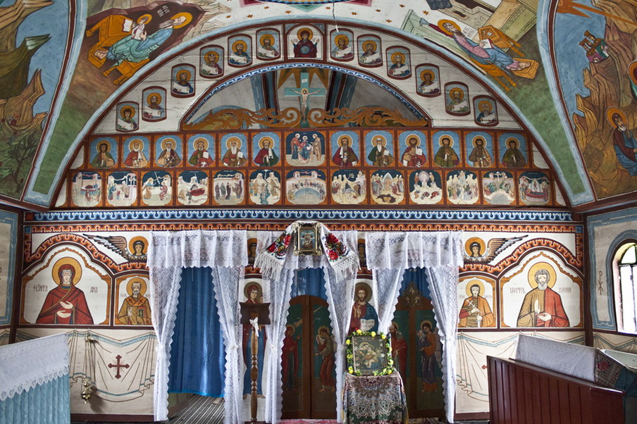 Biserica de lemn din Adalin, judeţul Sălaj.